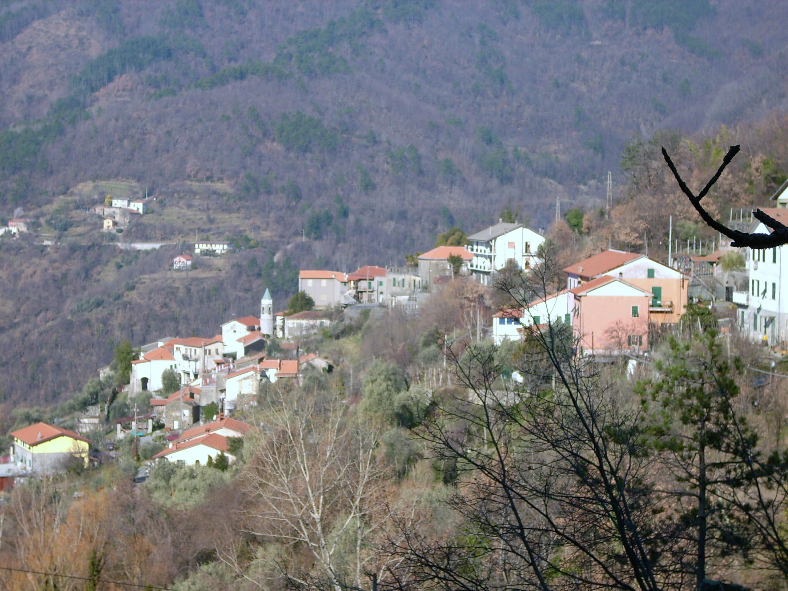 Panorama di Zignago, Liguria, Italy